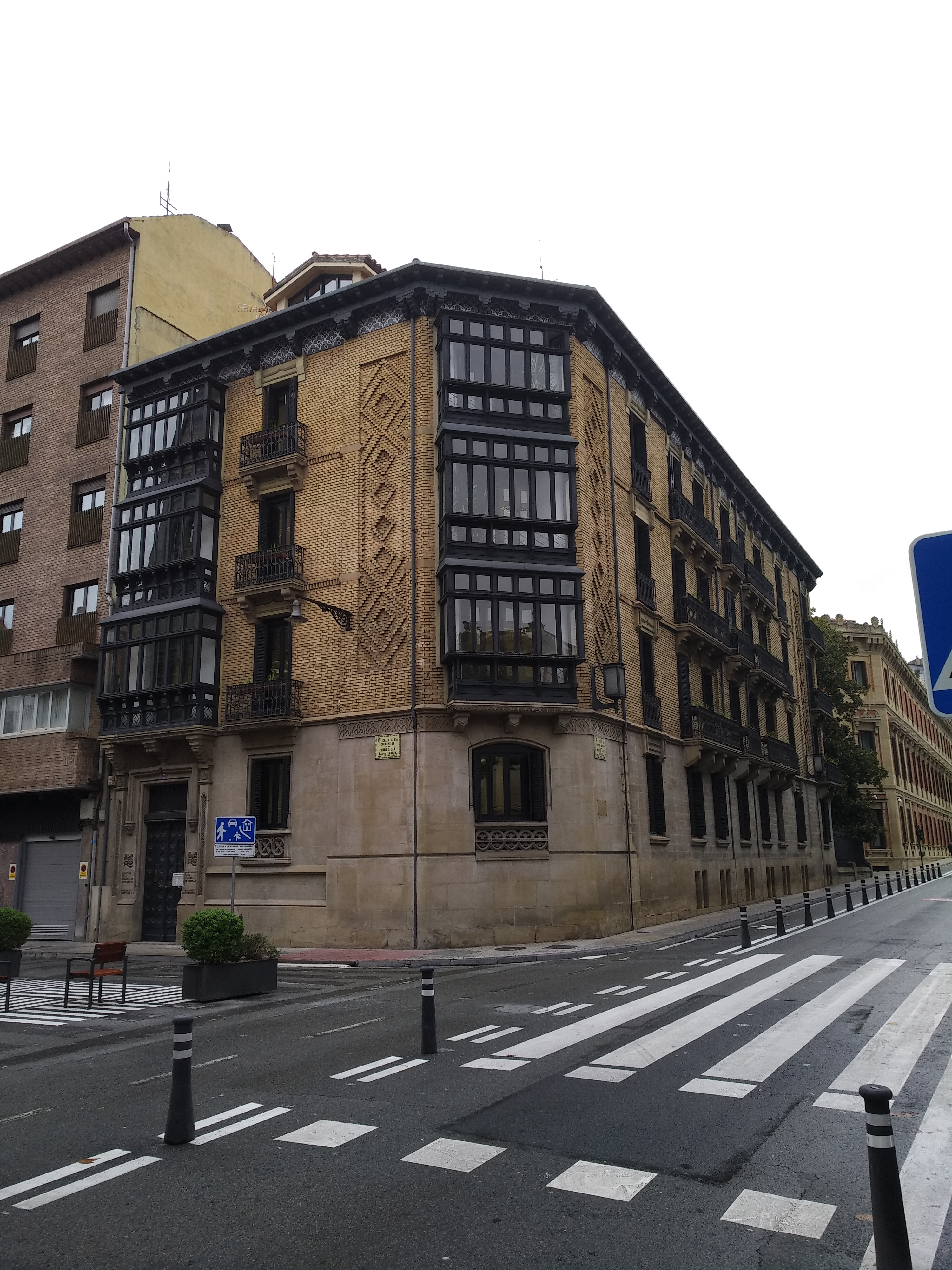 Edificio sito en la calle General Chinchilla Nº 7